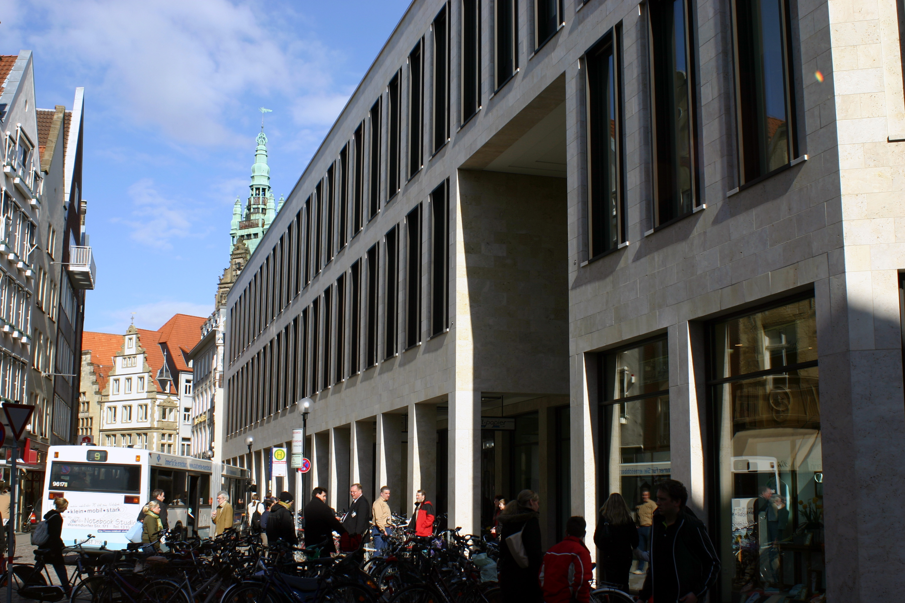 Die Münster Arkaden sind ein modernes Einkaufszentrum in unmittelbarer Nähe zum historischen Prinzipalmarkt in Münster, Westfalen (Architektenbüro: Kleihues + Kleihues).